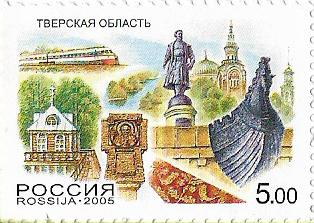 марка РФ